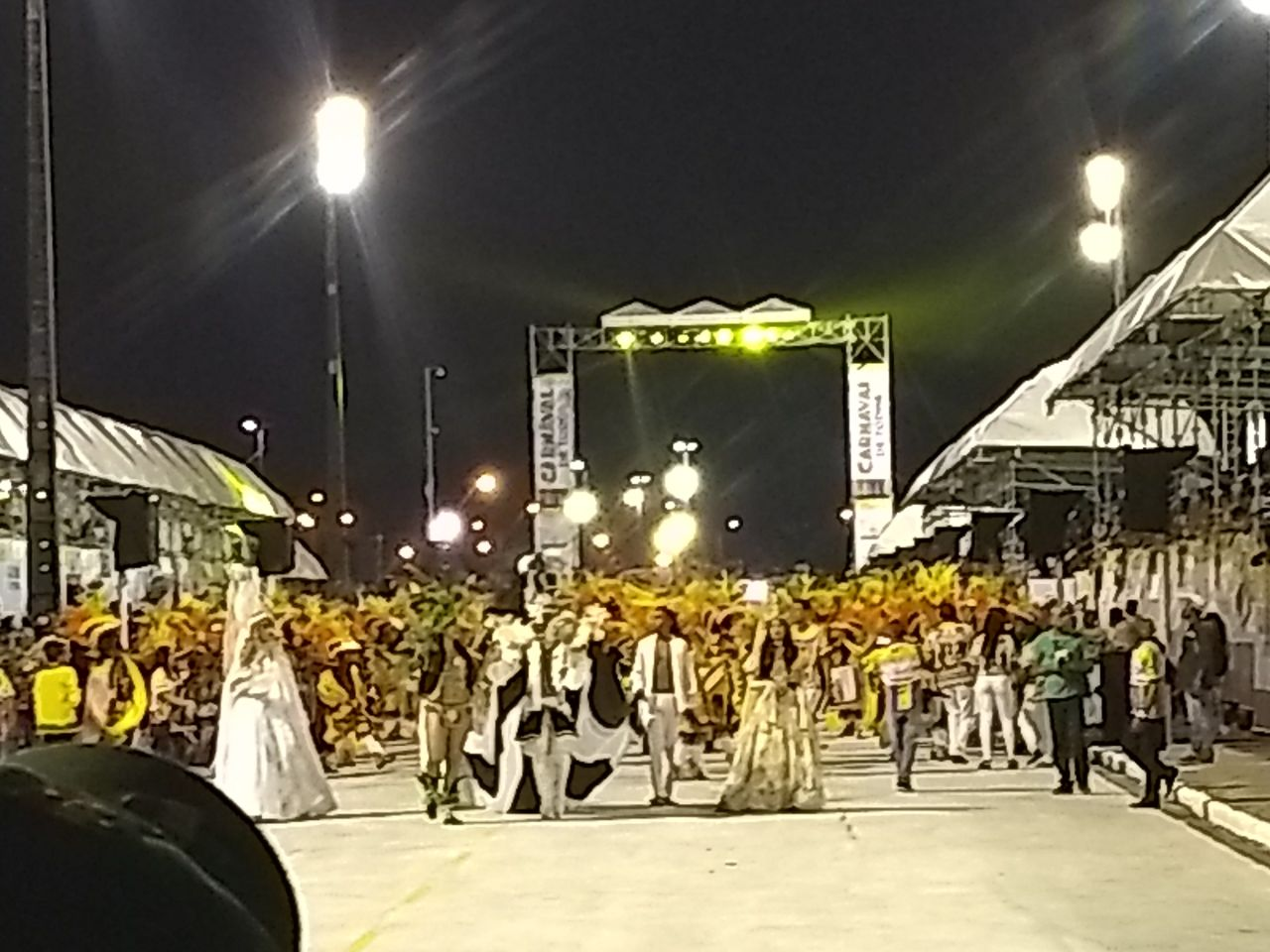 Escola da Liberdade